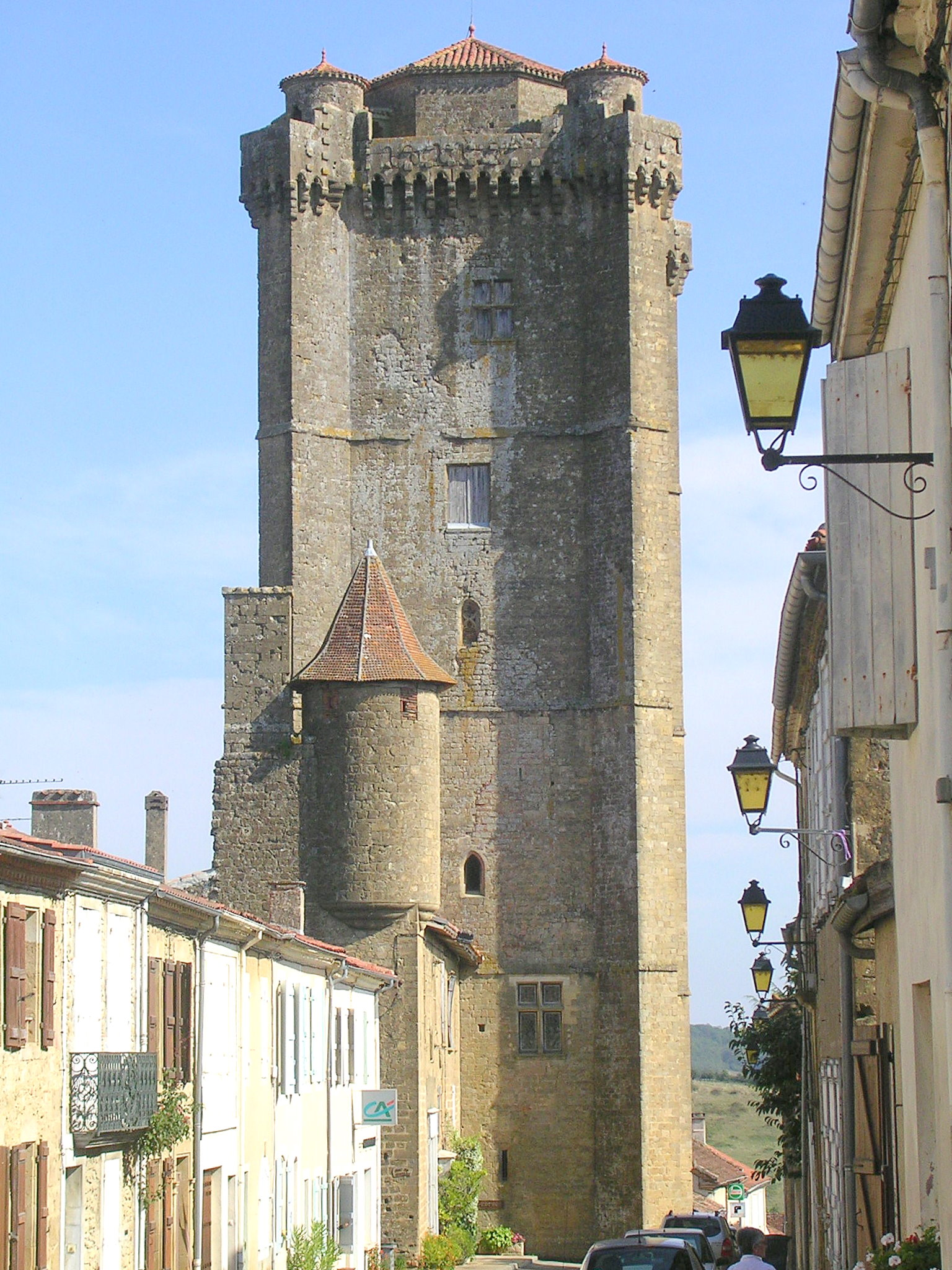 Bassoues, la tour